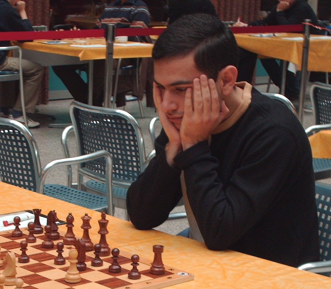 Gabriel Sargissjan am 29. Oktober 2006 bei einem Bundesliga-Wettkampf in Berlin-Tegel